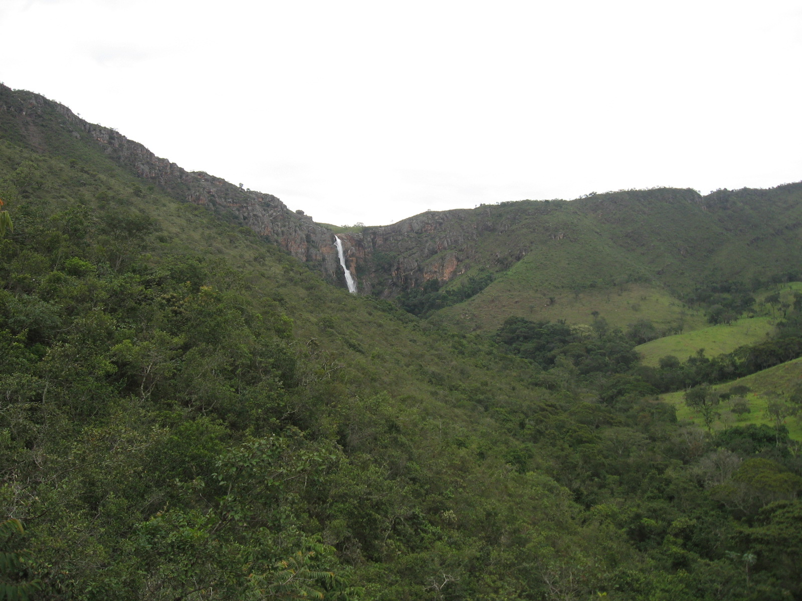 A caminho da Cachoeira do Cerradão, na região do Parque Nacional Serra da Canastra. Fotografia tirada em 2012, mês 01, dia 17.